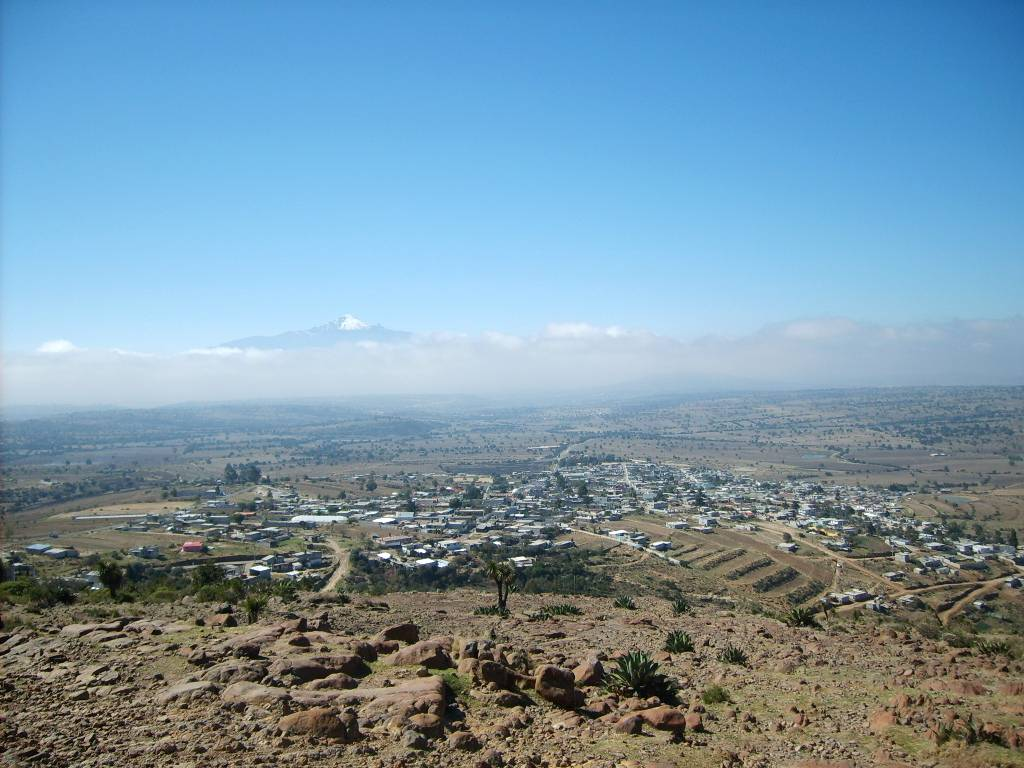 Panorámica de Terrenate, Tlaxcala